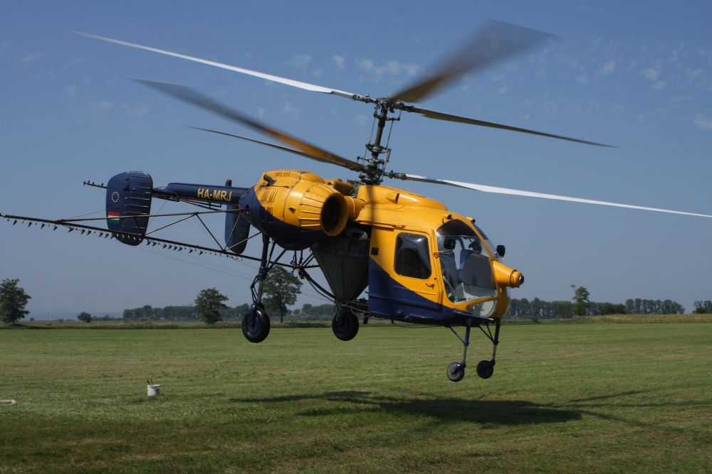 Kamov Ka–26 növényvédelmi helikopter felszállás közben, Sarród